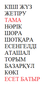 Есет батыр руы